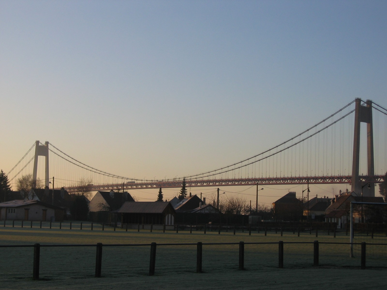 Pont de Tancarville, un matin de décembre 2004.